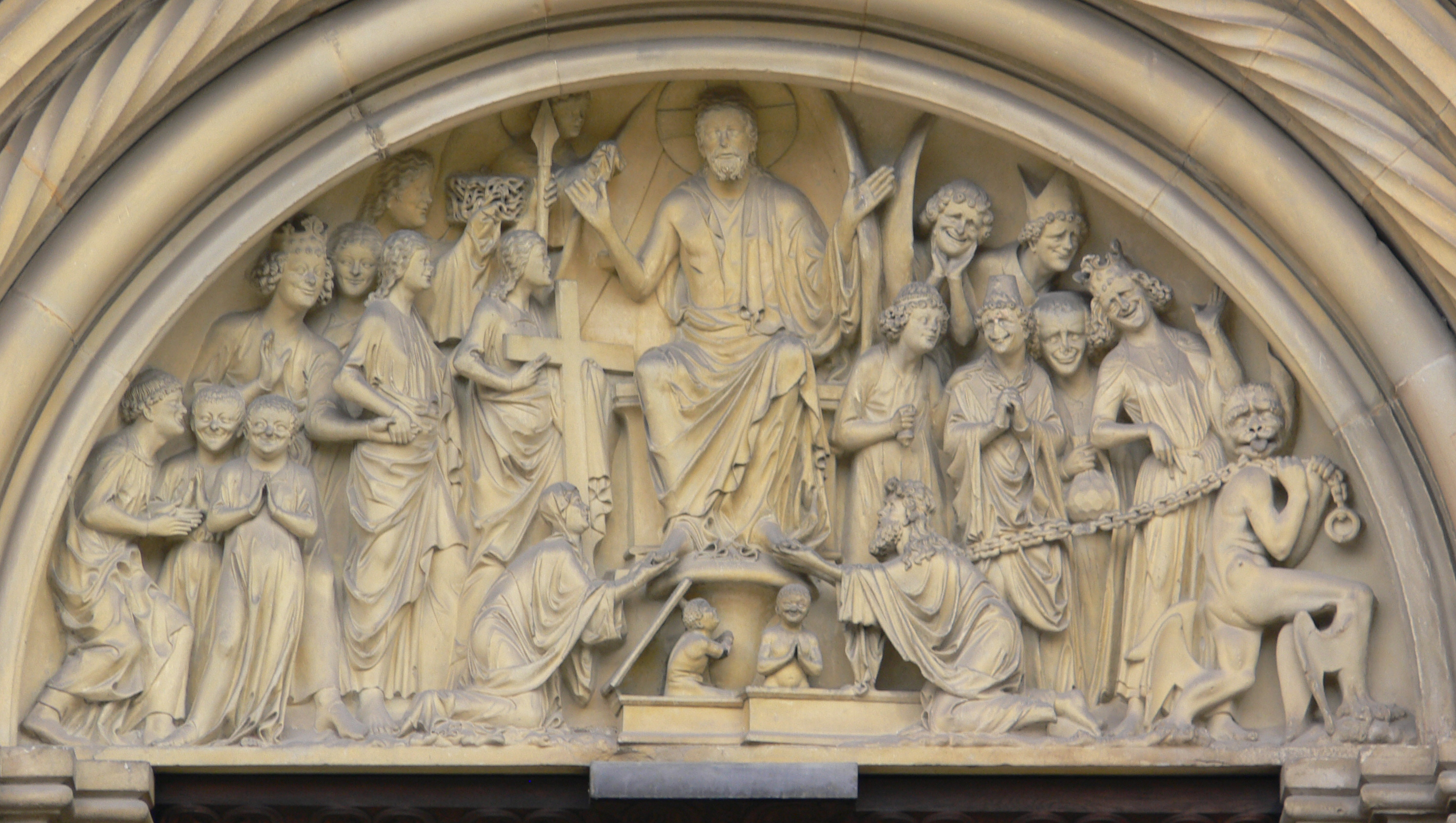 Bamberg, Dom St. Peter und St. Georg Fürstenportal: Tympanon "Das jüngste Gericht"